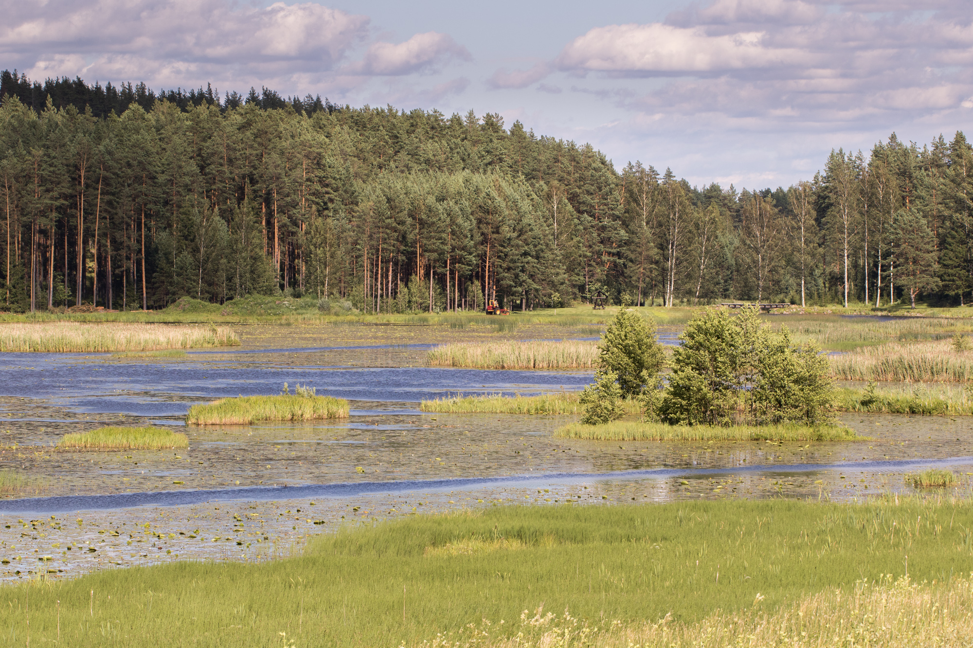 Tabina järv